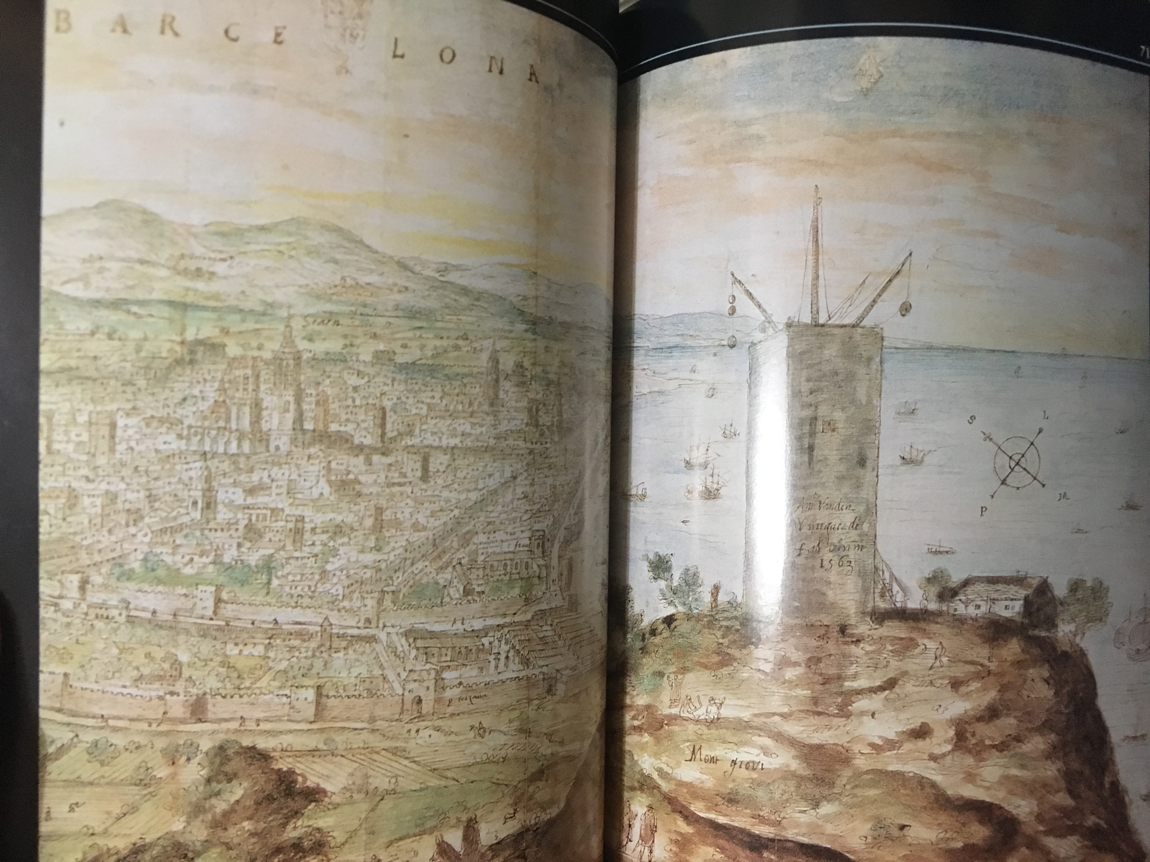 Barcelone, gouache de Van Wyngaerde, 1563. Bibl. nationale, Vienne. — Double page d’image dan le livre Barcelone, la passion de la liberté de Pascal Torres Guardiola, collection « Découvertes Gallimard / Mémoire des lieux » (nº 142), description à la page 172. Éditions Gallimard, 22 mai 1992.